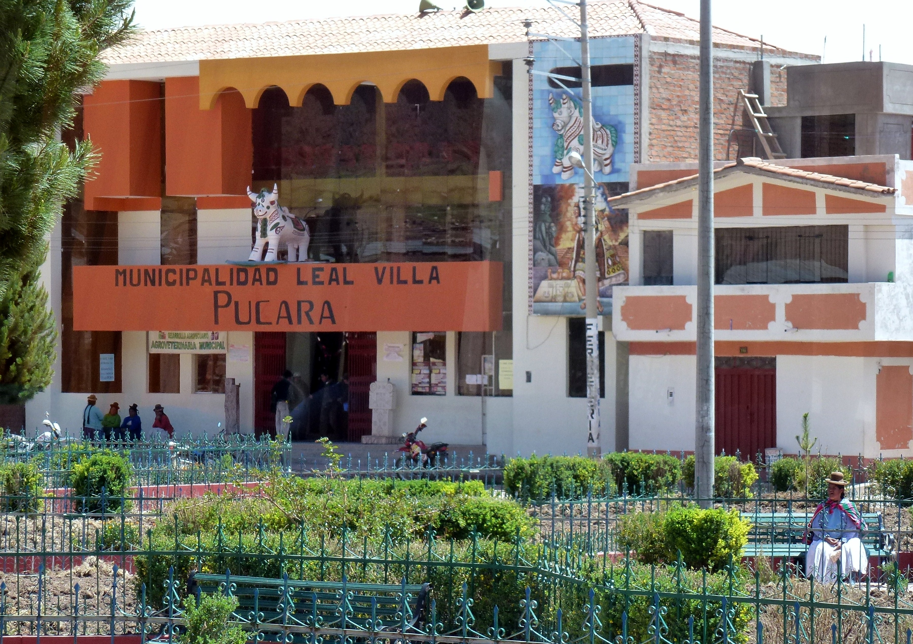 Pucará Distrito_de_Pucará_(Lampa) au Pérou.